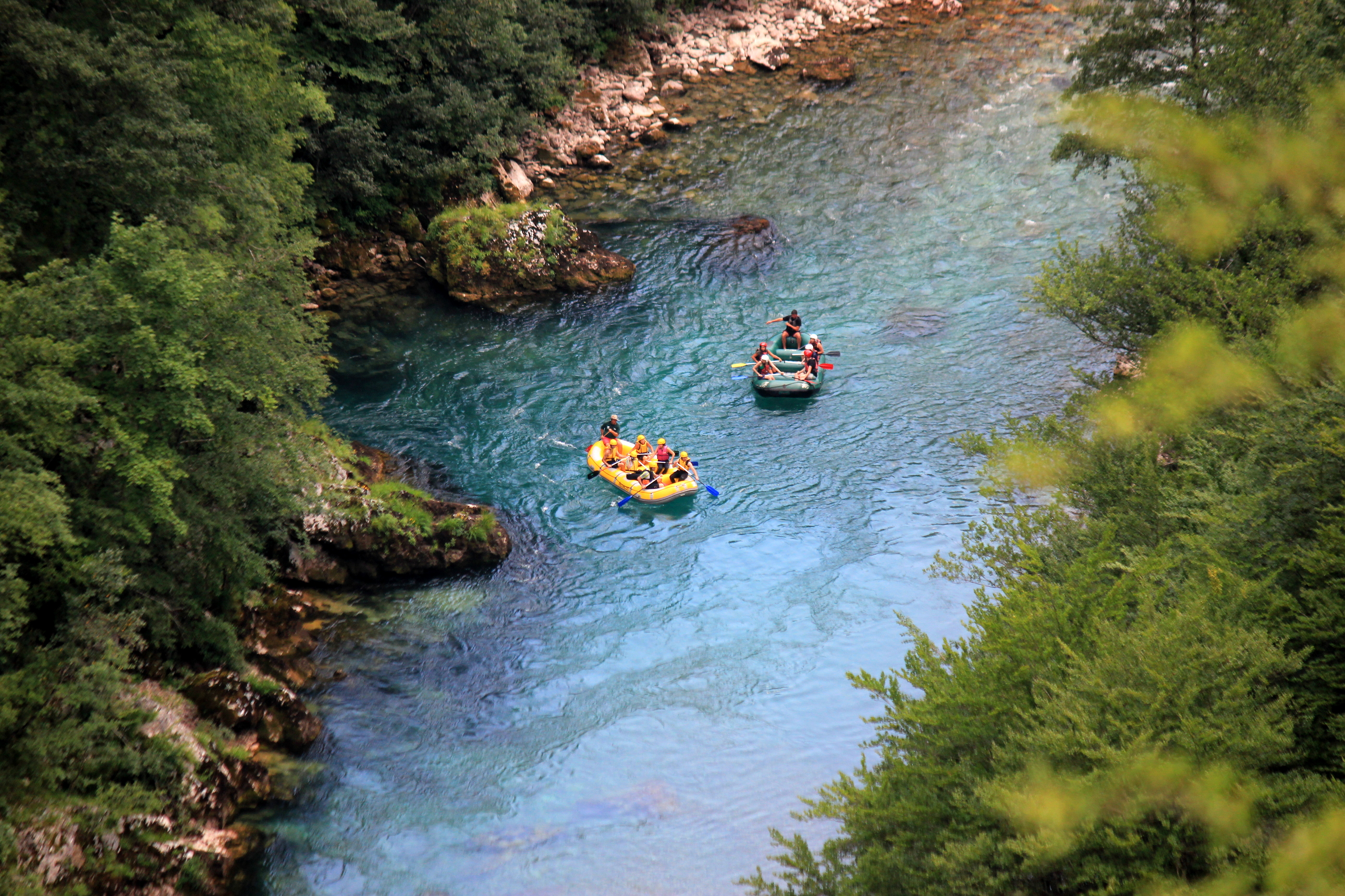 Rafting auf der Tara in Montenegro.Hornjoserbsce: Rěka Tara na sewjeru Čorneje hory.